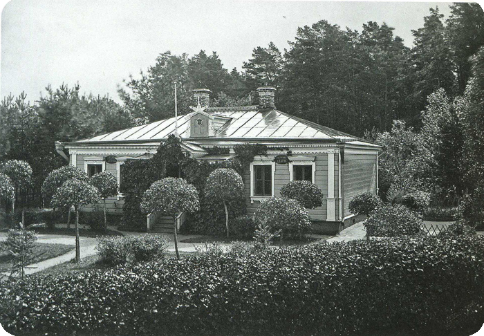 Александровское убежище в Москве. Один из жилых домов.